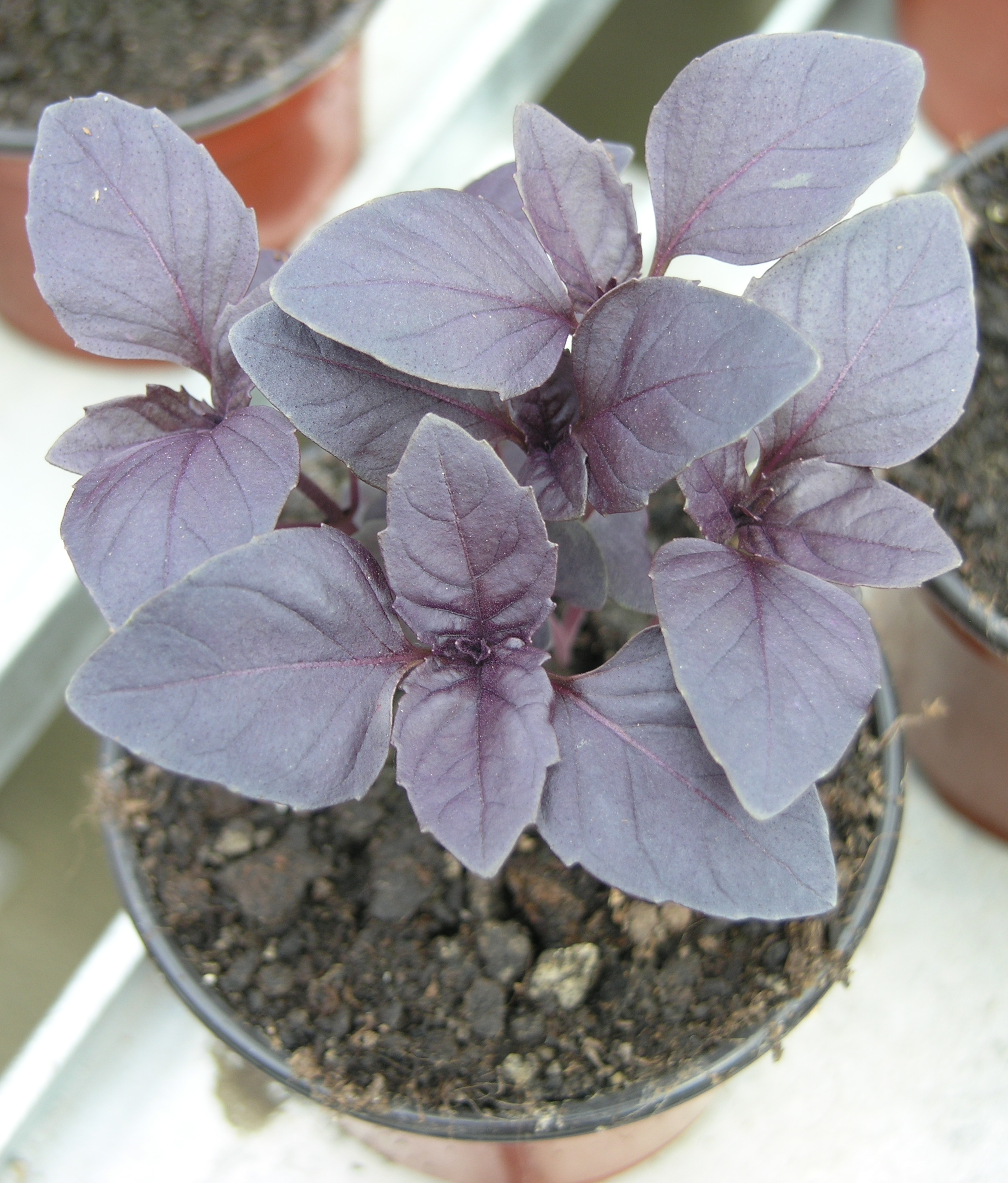 Basilikum rotblättrig 'Opal'